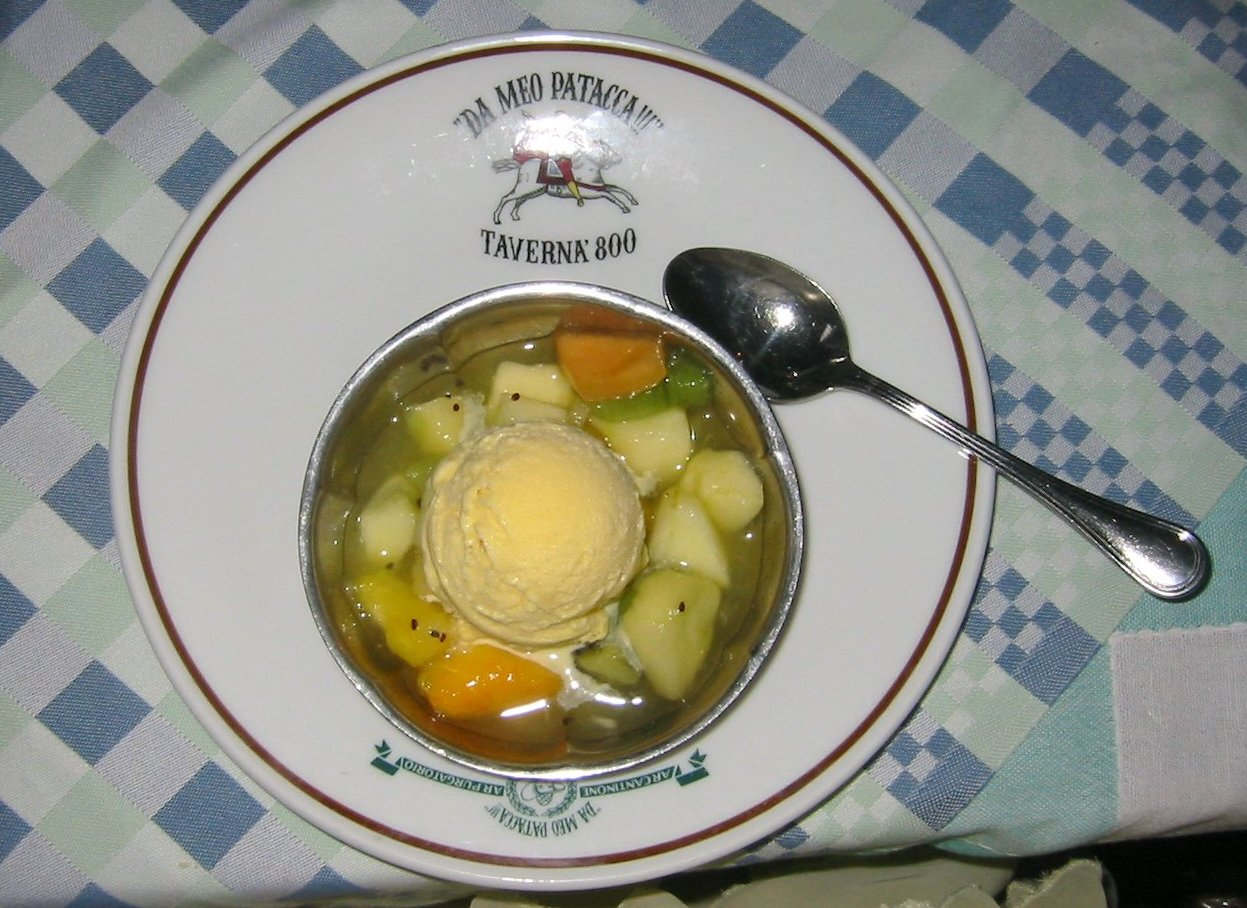 con gelato